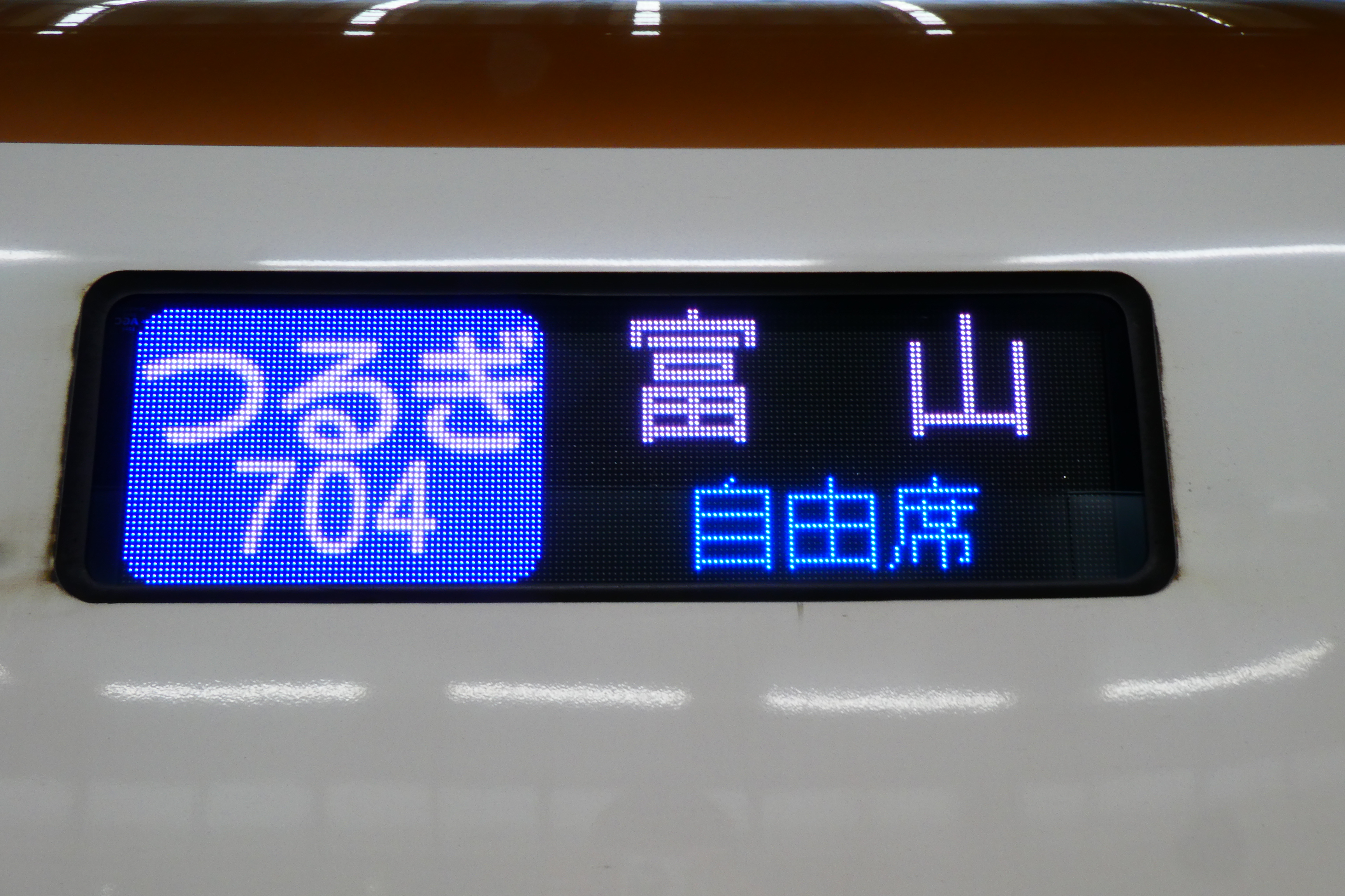 新幹線つるぎ号側面LED